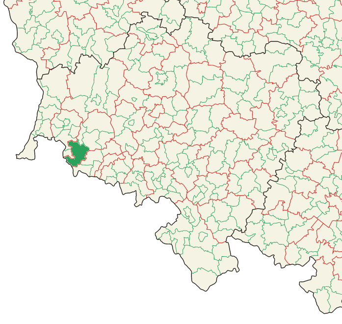 Mapa administracyjna Polski z zaznaczonymi granicami województw (na czarno), powiatów (na czerwono) i gmin (na zielono), południowo zachodni wycinek, województwo dolnośląskie, wycinek z zaznaczeniem gminy Mirsk. Stan na 1 stycznia 2008